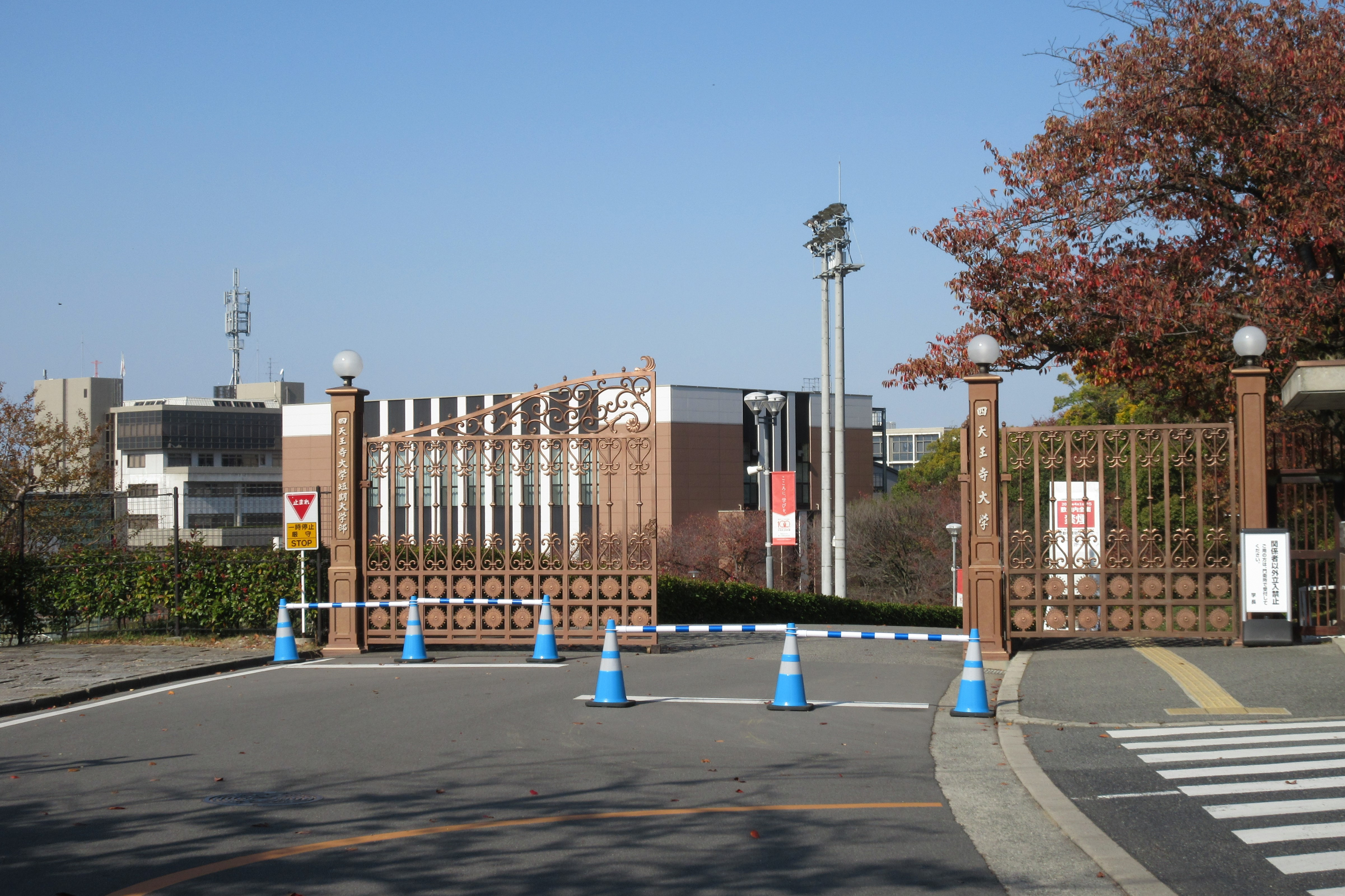 四天王寺大学正門